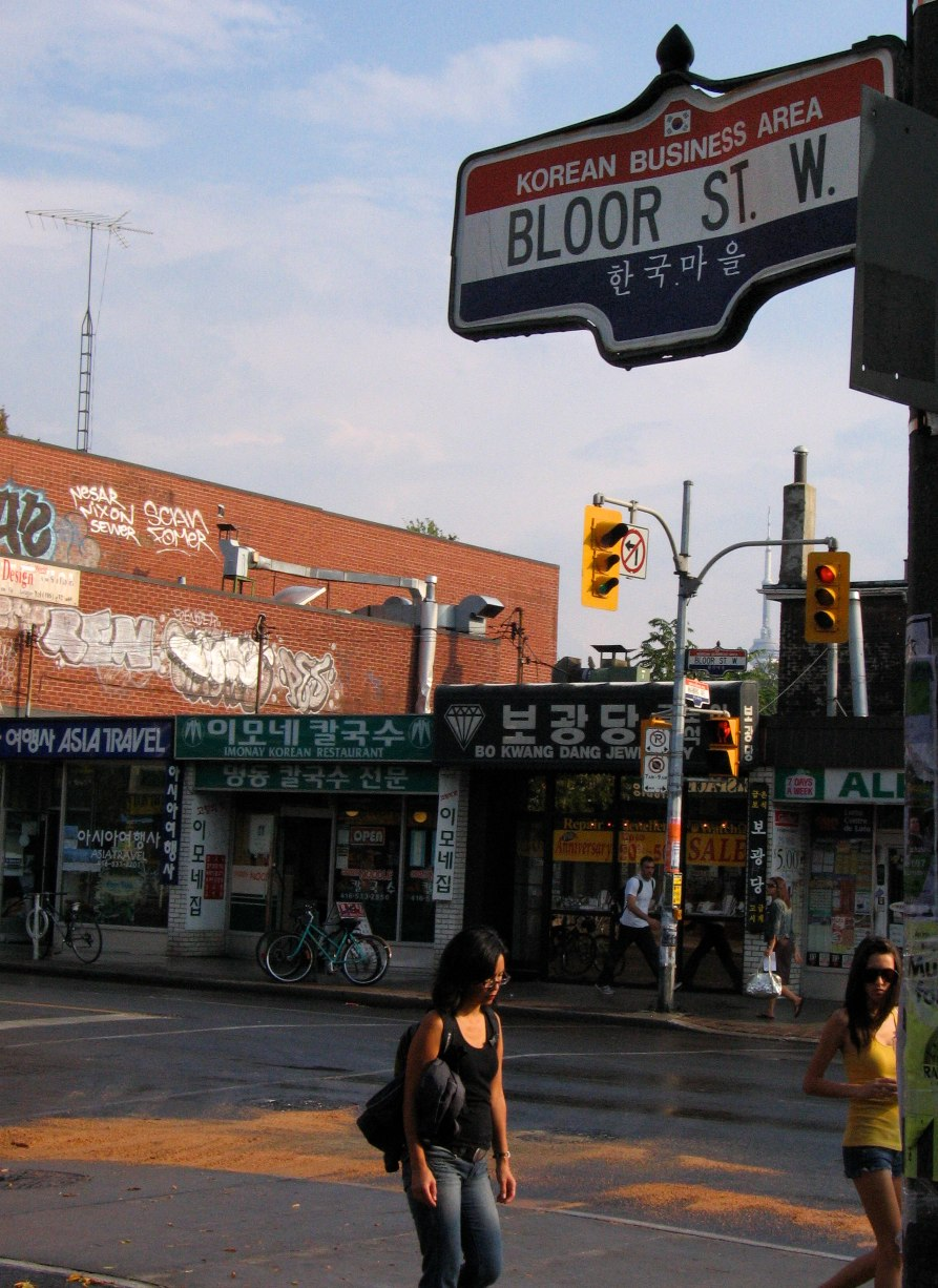 Visite à Toronto en 2007